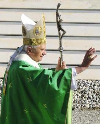 Papst Bendikt in München